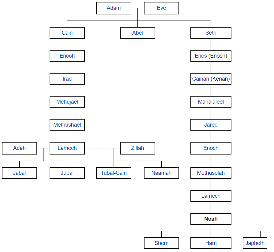 Gia phả Noah